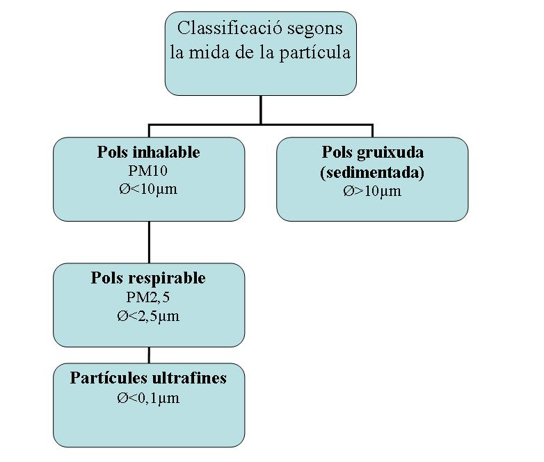 esquema de la mida de les partícules de pols